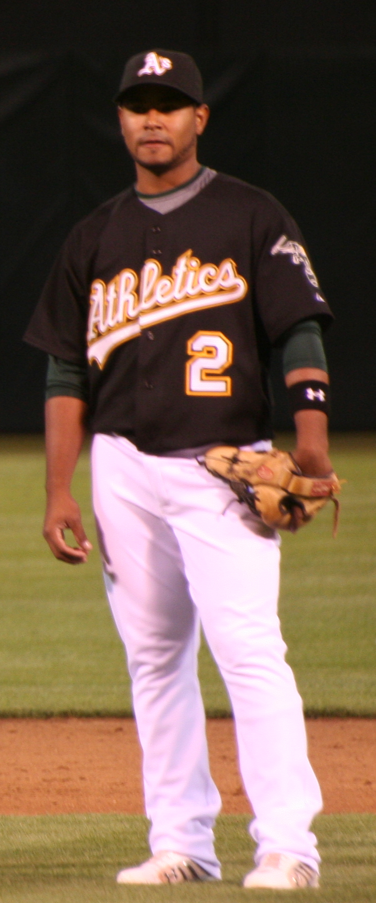 Gregorio Petit